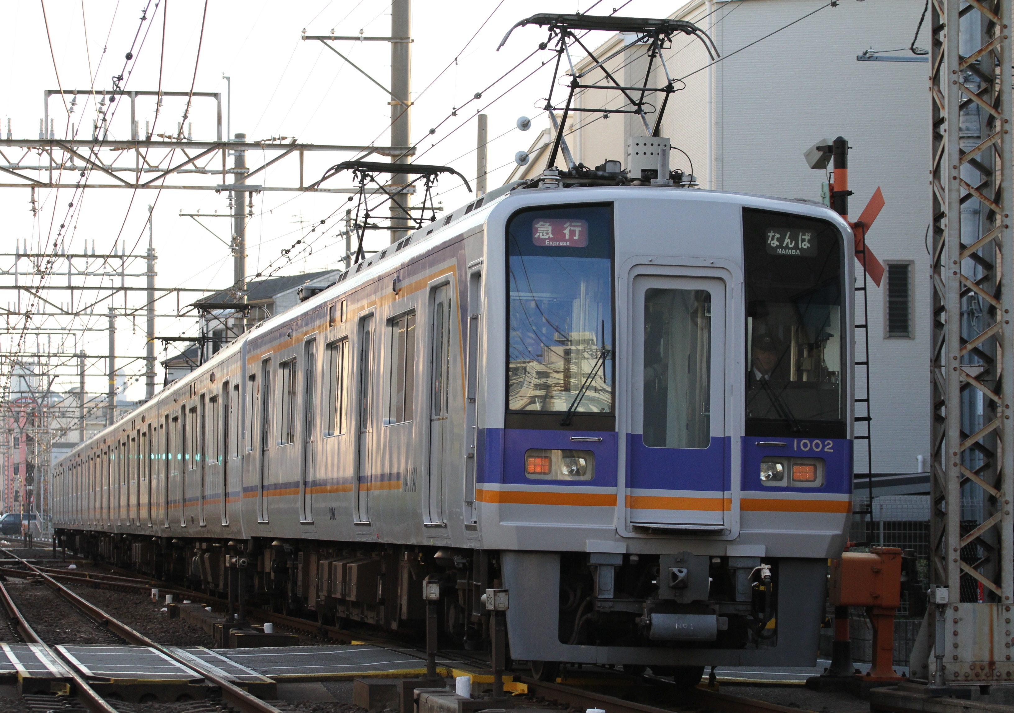 南海1000系（2代目）1次車